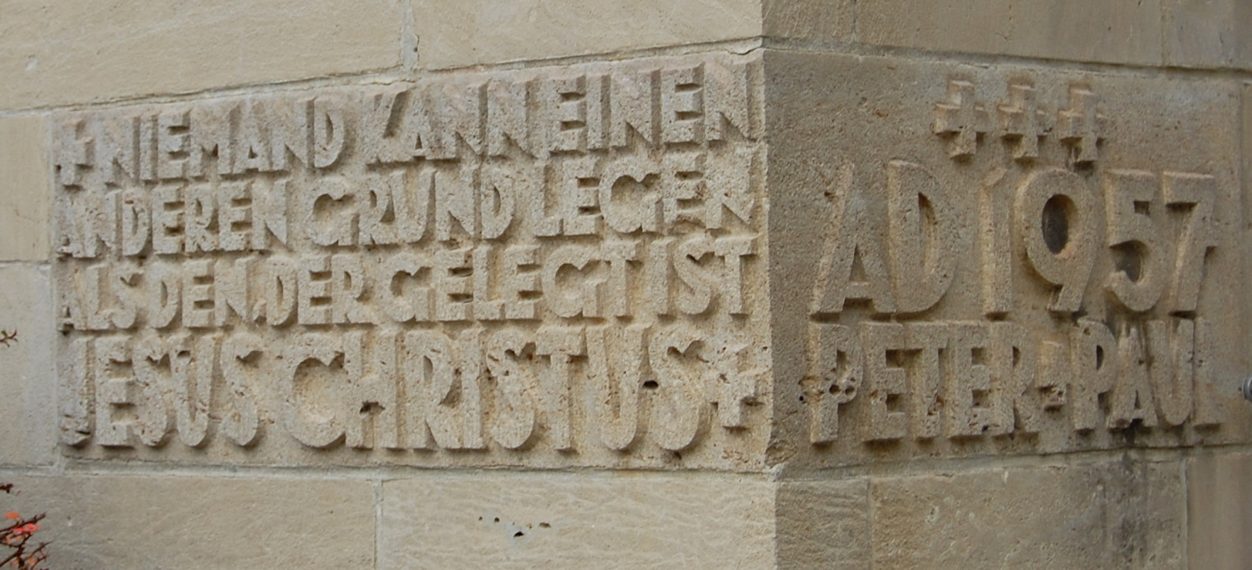 Inschrift an der Südwestecke der katholischen Peter-und-Paul-Kirche in Naumburg